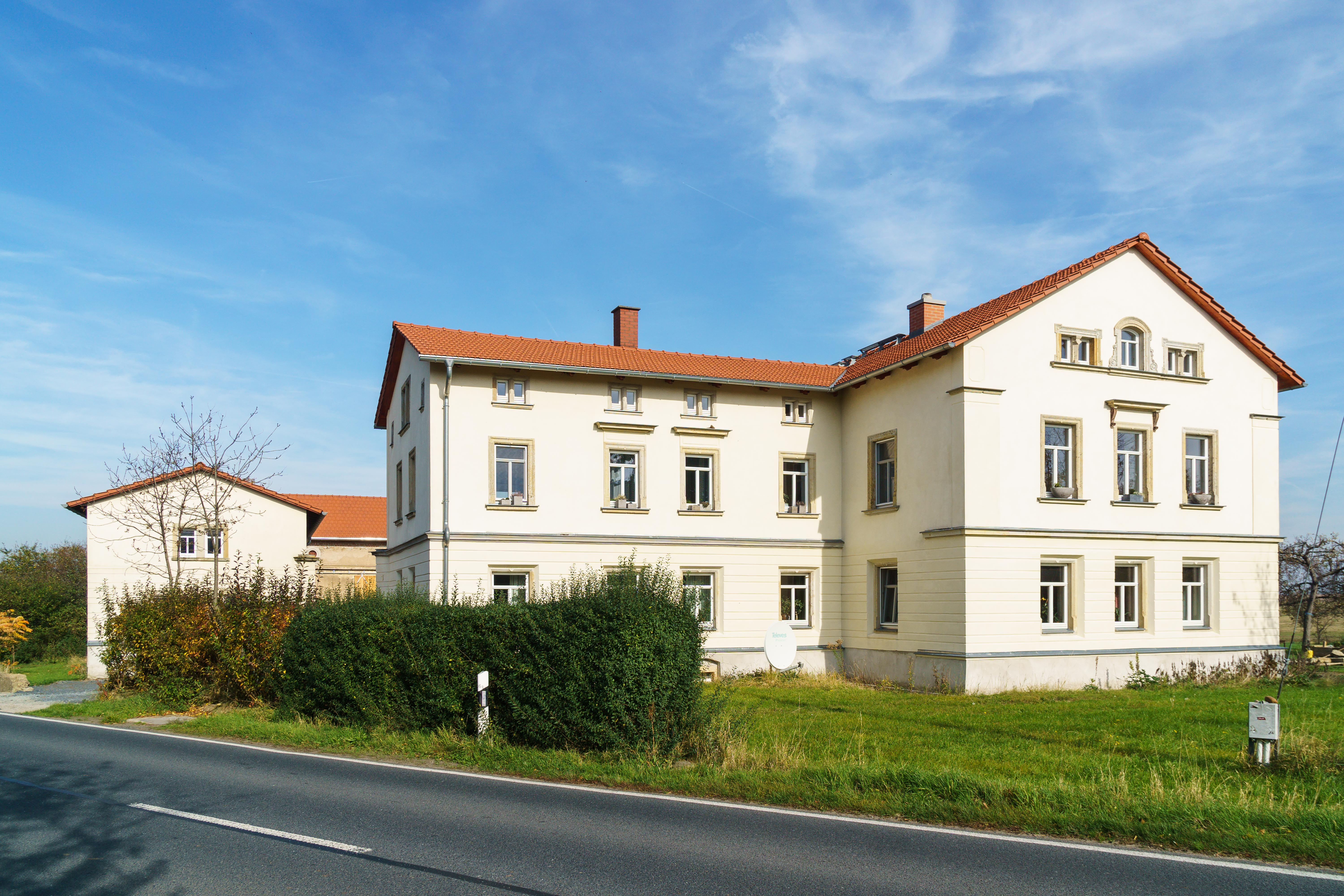 Wohnhaus eines Vierseithofes, Dresdner Straße 1 in Niederau OT Großdobritz